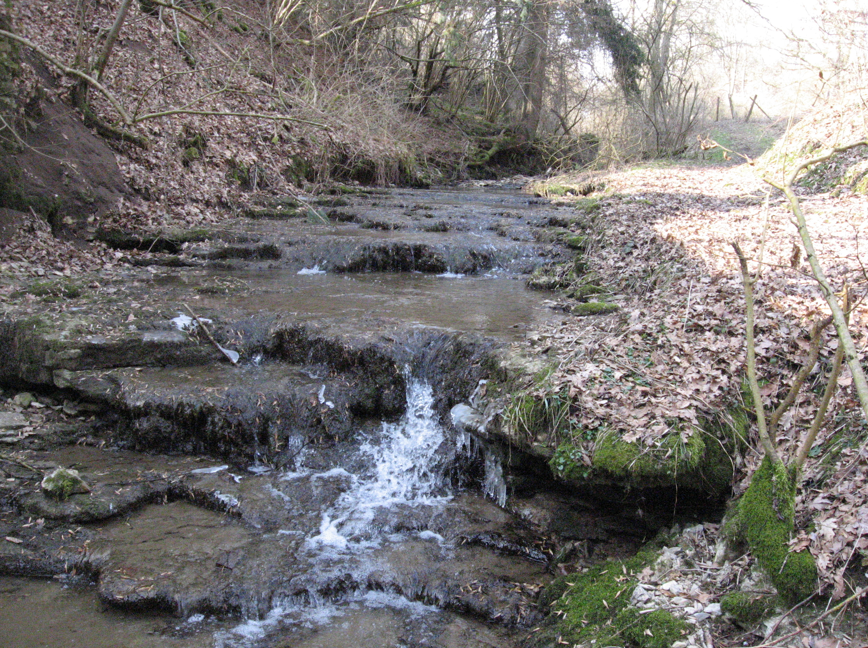 Bänke in der oberen Steinbach-Klinge südöstlich des Vellberger Hörgershofes. Blick talauf nach WNW.